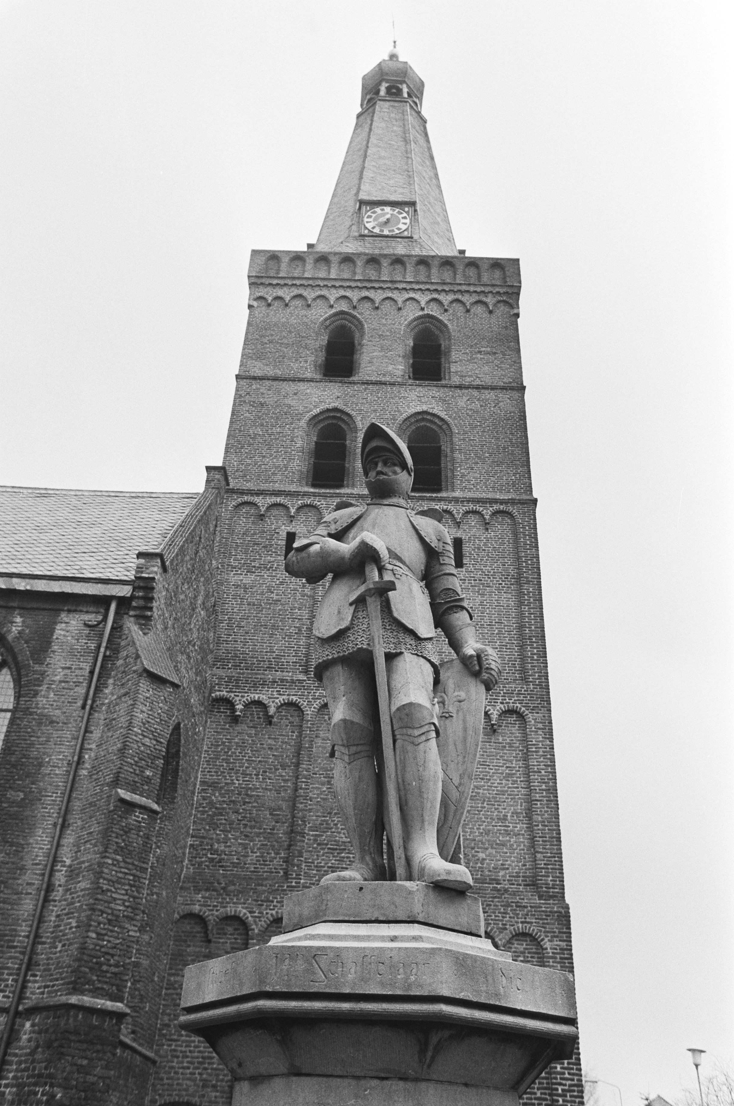 Collectie / Archief : Fotocollectie Anefo Reportage / Serie : [ onbekend ] Beschrijving : Jaar van Jan van Schaffelaar officieel in Barneveld geopend. Een standbeeld voor de toren Hervormde Kerk in Barneveld in 1482 Datum : 5 januari 1982 Locatie : Barneveld Trefwoorden : Standbeelden, torens Persoonsnaam : Jan van Schaffelaar Fotograaf : Bogaerts, Rob / Anefo Auteursrechthebbende : Nationaal Archief Materiaalsoort : Negatief (zwart/wit) Nummer archiefinventaris : bekijk toegang 2.24.01.05 Bestanddeelnummer : 931-8938